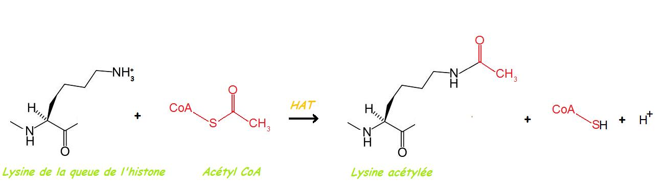 Equation de l'acétylation des lysines spécifique des queues N-terminales des histone, catalysée par l'HAT